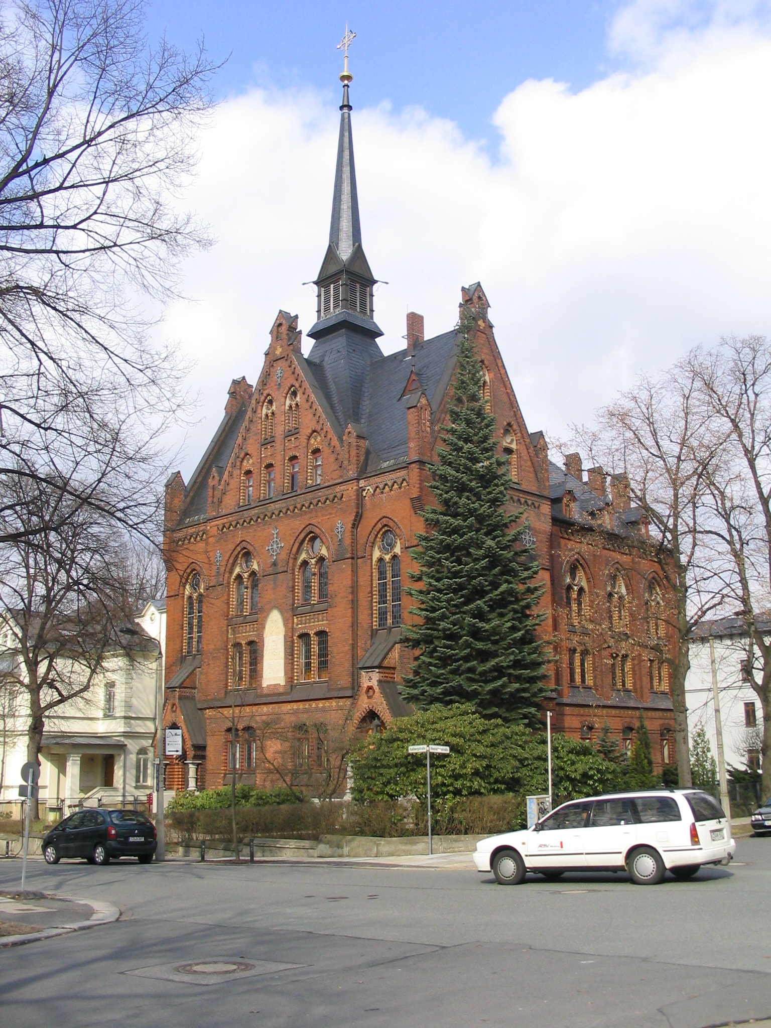 Methodistische Friedenskirche in Chemnitz, Kaßberg, Aufgenommen am 11.04.2006 von Dr. Hagen Graebner